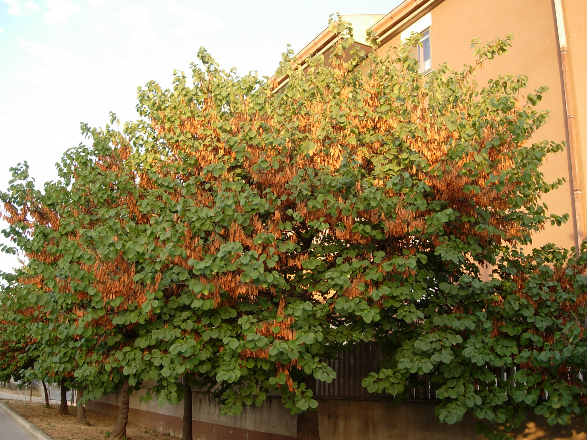 Foto scattata in Sardegna durante l'estate Photo taken in Sardinia during summertime.--Sirbone72 15:17, 23 December 2005 (UTC)